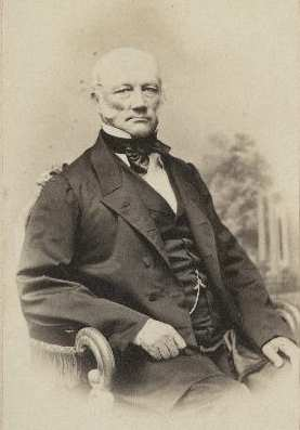 Eestimaa maanõunik ja rüütelkonna peamees Moritz von Engelhardt (1800-1870)